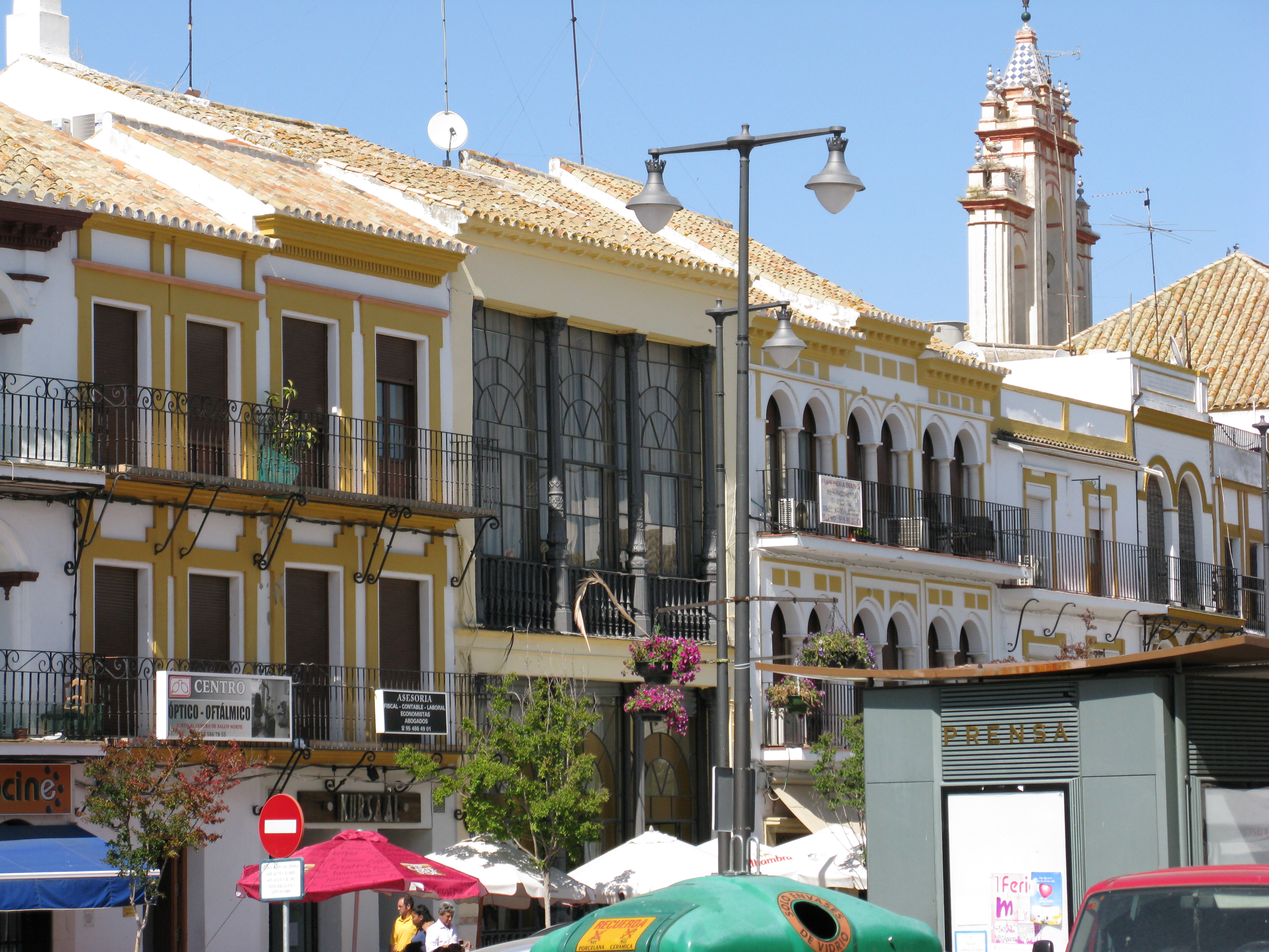 Plaza del Altozano, en Utrera (Sevilla), España.